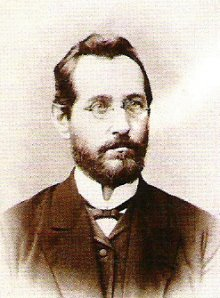 František Dvorský